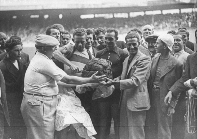 Tour de France 1937, 20e étape Caen-Paris le 25 juillet : Parc des Princes, Mario Vicini (individuel italien) 2e du Tour, coupe le gâteau offert à Roger Lapebie (équipe de France) gagnant du Tour 1937